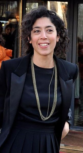 Naidra Ayadi au déjeuner des nommés des César du cinéma